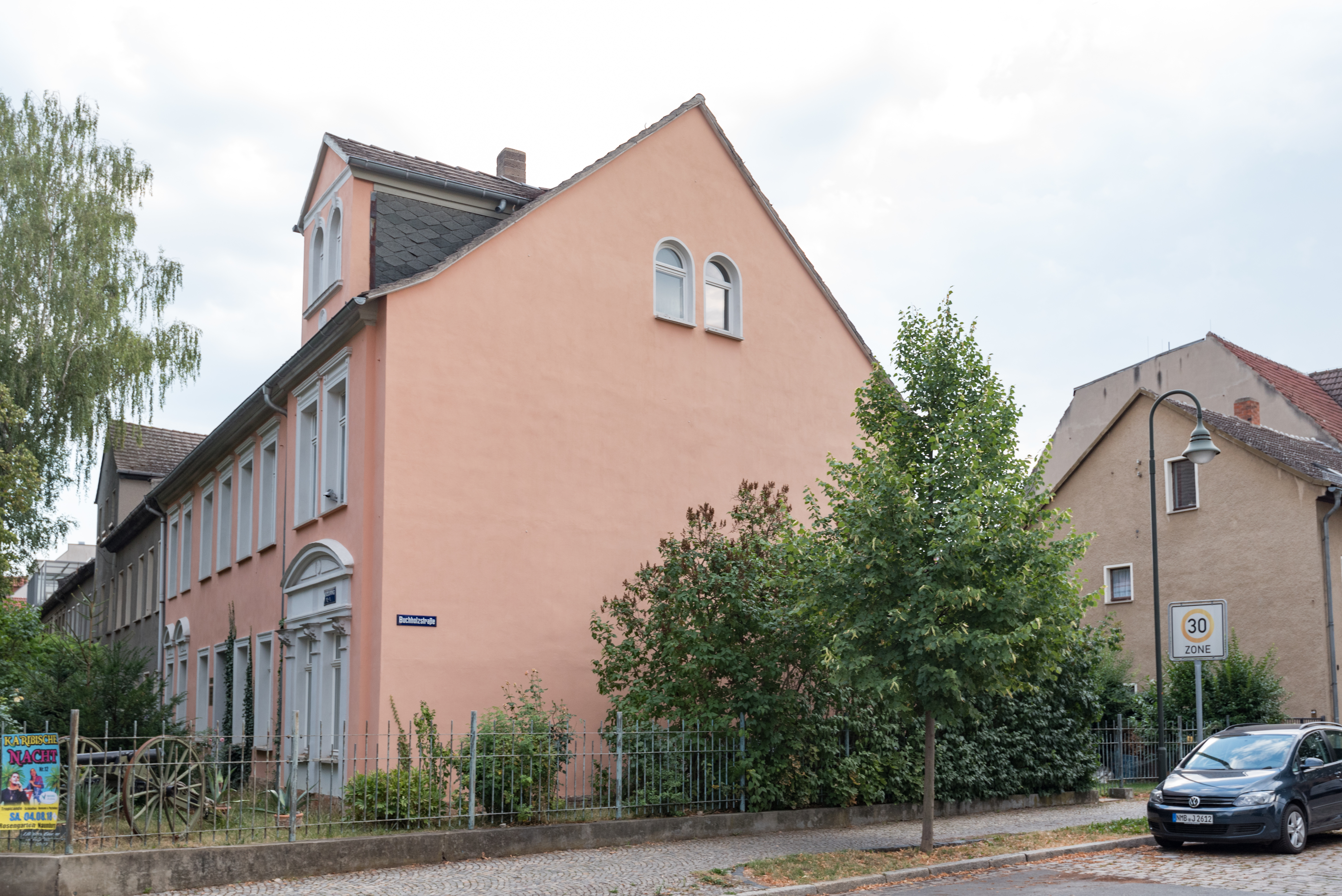 Naumburg (Saale), Wenzelsring 1